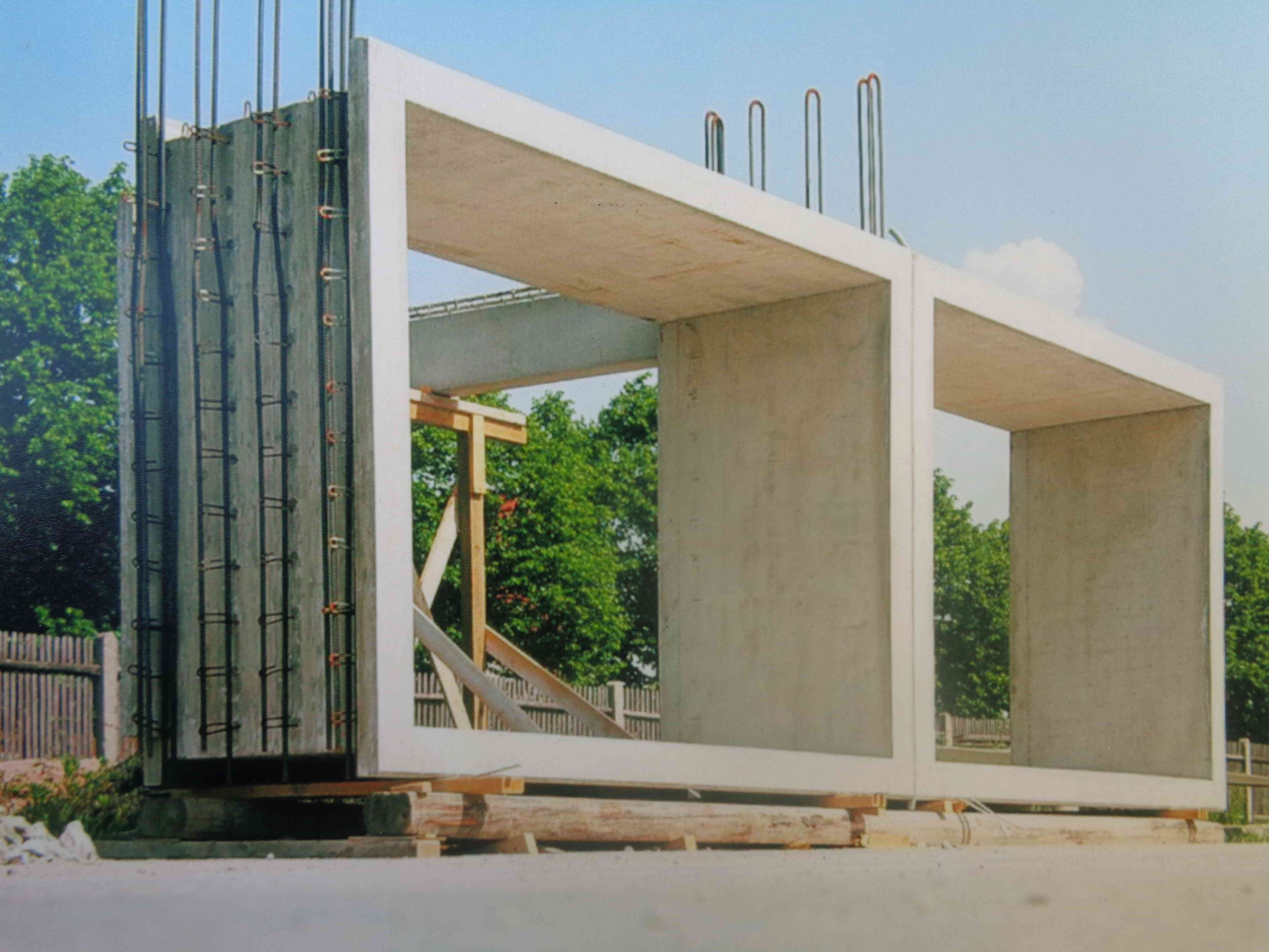 Bausatzverfahren: Zwei Rahmenteile im Hintergrund Verbindungsträger